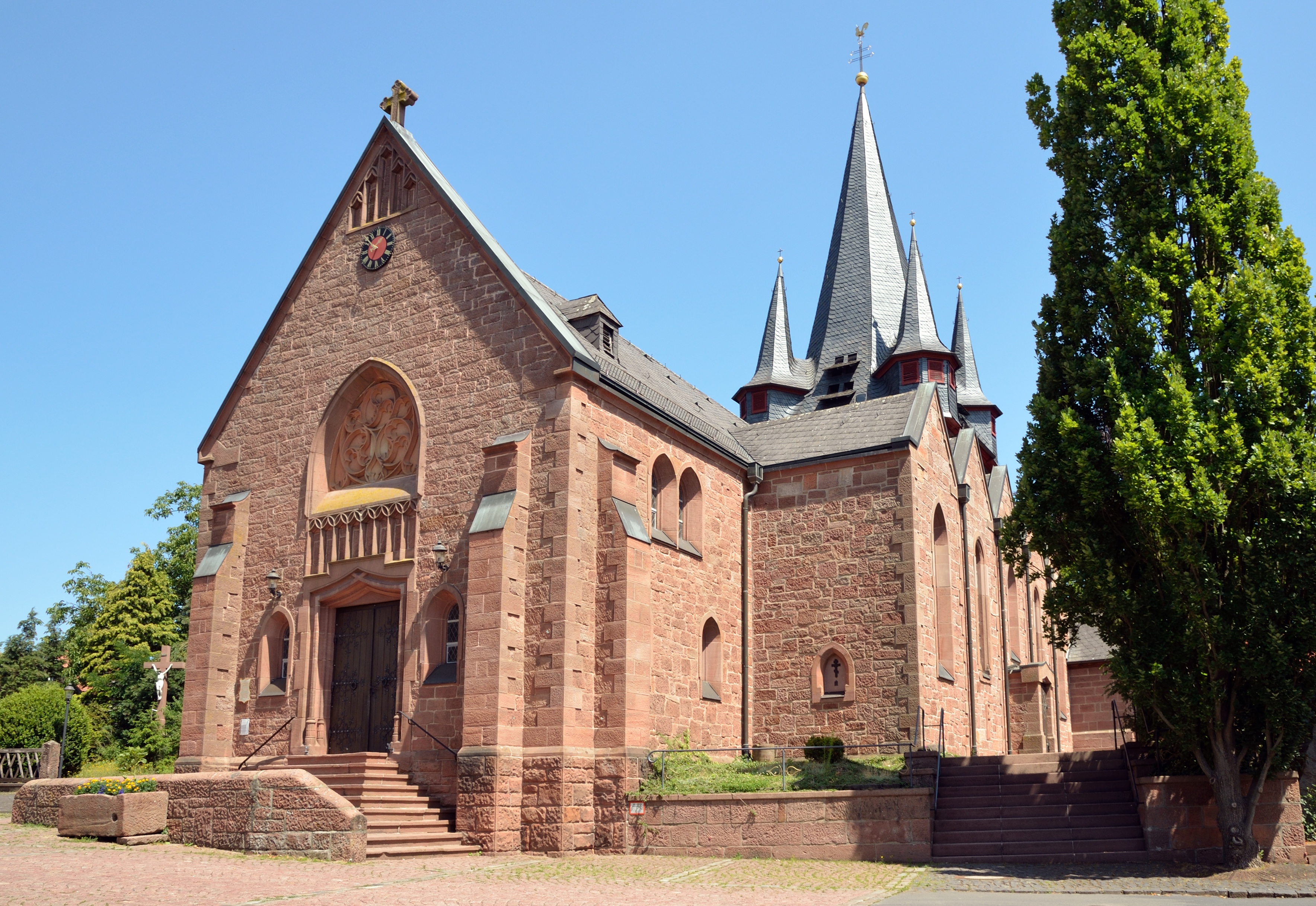 Die Pfarrkirche St. Cyriakus in Marburg-Bauerbach